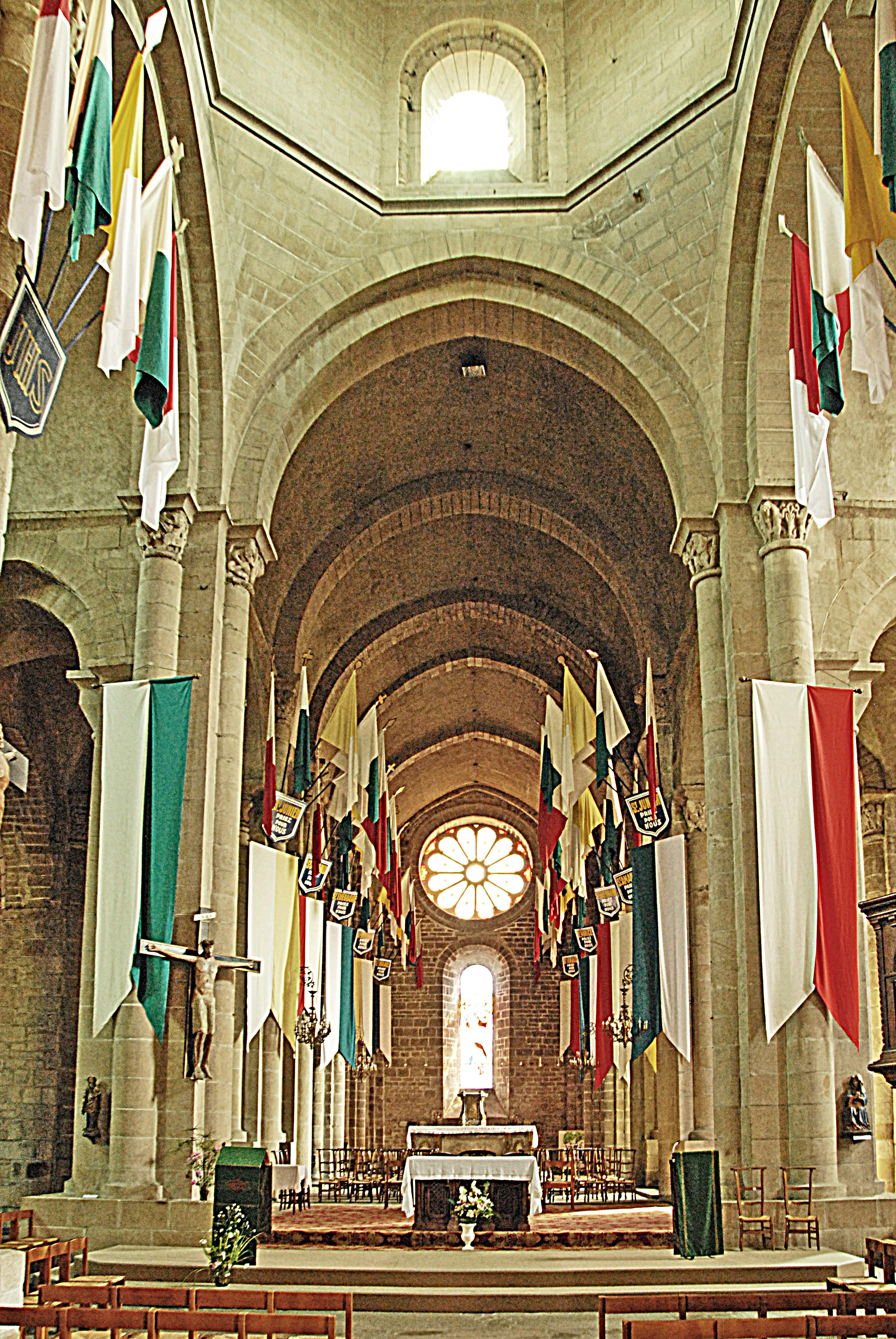 St-Junien. Vierung, zum Chor